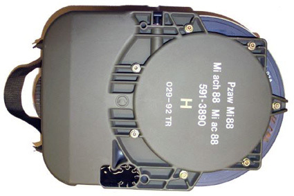 Pzaw Mi 88